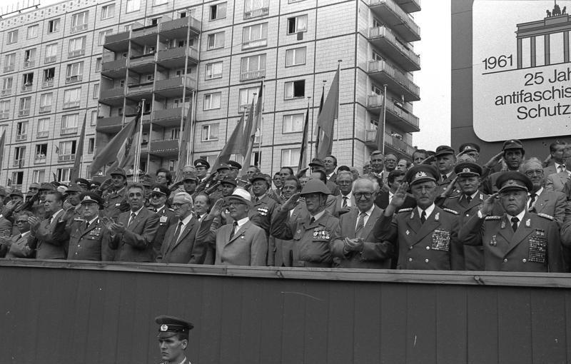 ADN-ZB/Mittelstädt/13.8.86 Berlin: Kampfappell. - Auf der Tribüne wurden der Generalsekretär des ZK der SED und Vorsitzende des Staatsrates der DDR, Erich Honecker, Vorsitzender des Nationalen Verteidigungsrates der DDR, und weitere Mitglieder der Partei- und Staatsführung begrüßt. In der Karl-Marx-Allee fand anlässlich des 25. Jahrestages der Errichtung des antifaschistischen Schutzwalls ein Kampfappell statt.